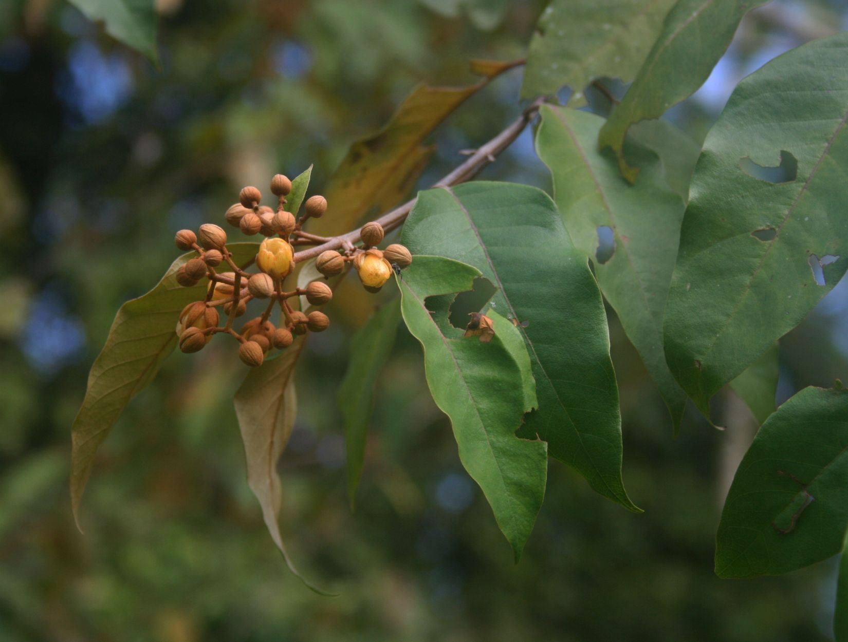 Vismia baccifera, Johanniskrautgewächse (Hypericaceae) - Costa Rica: Prov. Puntarenas, La Gamba NW Golfito, "Fila Trail" NW "Tropenstation La Gamba"/"Estación Biológica La Gamba"